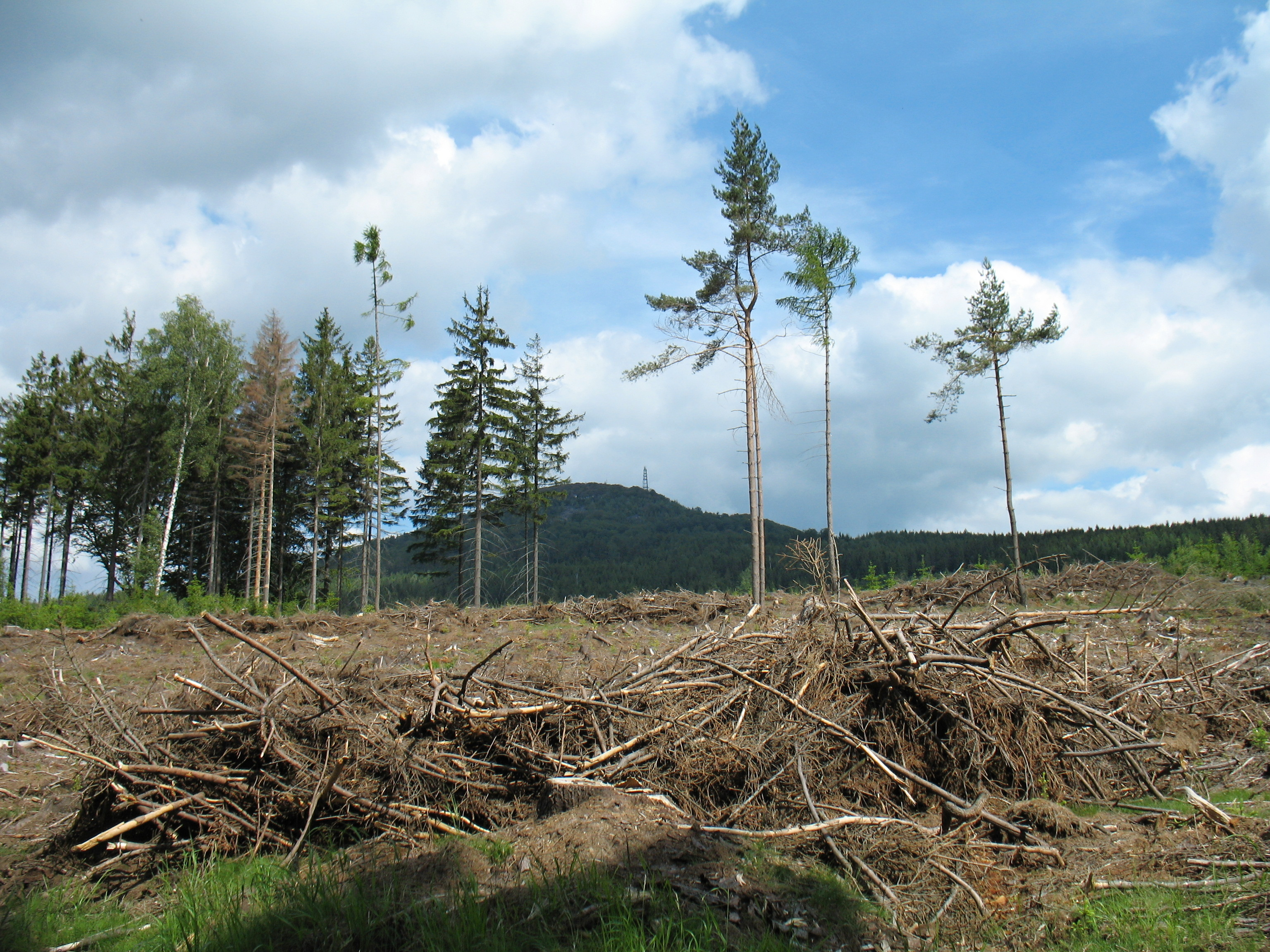 Pohled na Jedlovou od jedlovského nádraží. Likvidace kůrovcové kalamity